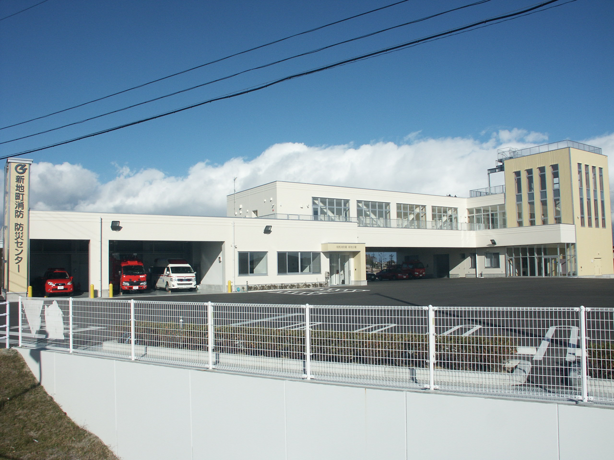 新地町消防防災センター（相馬地方広域消防本部 相馬消防署 新地分署）